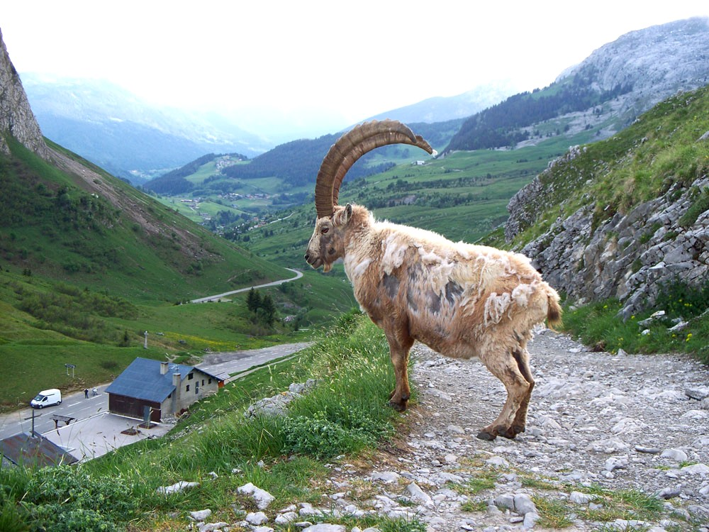 Au dessus du col de la colombiere